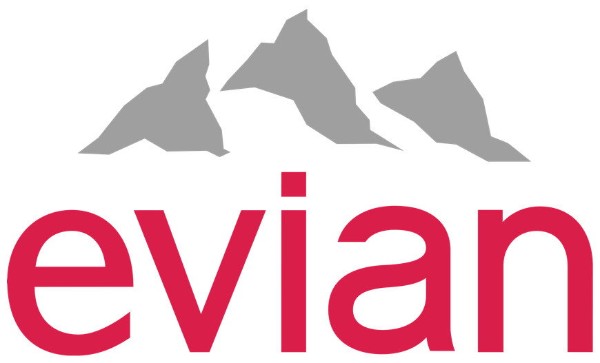 Logo von Evian